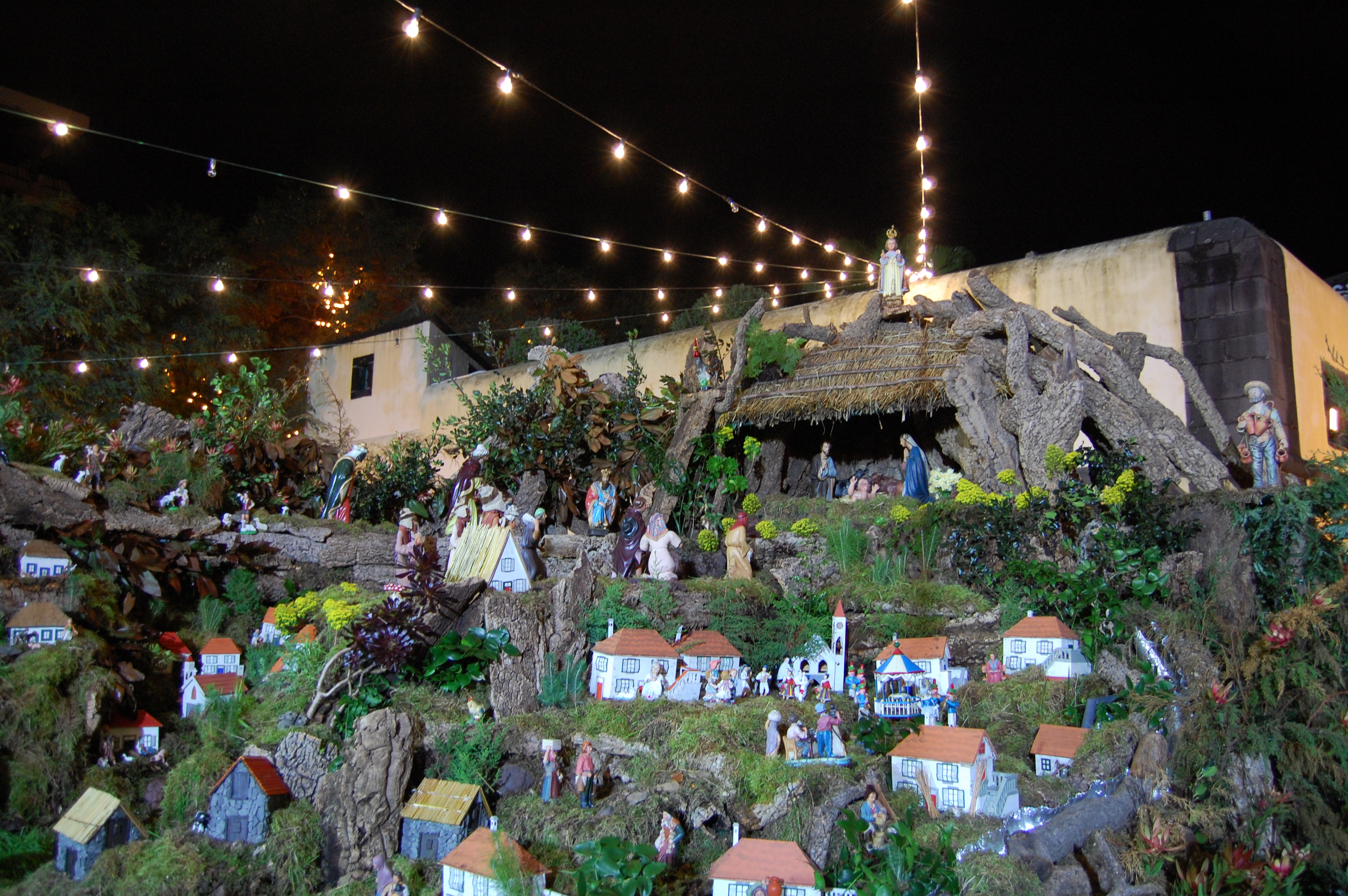 Lapinha, Funchal